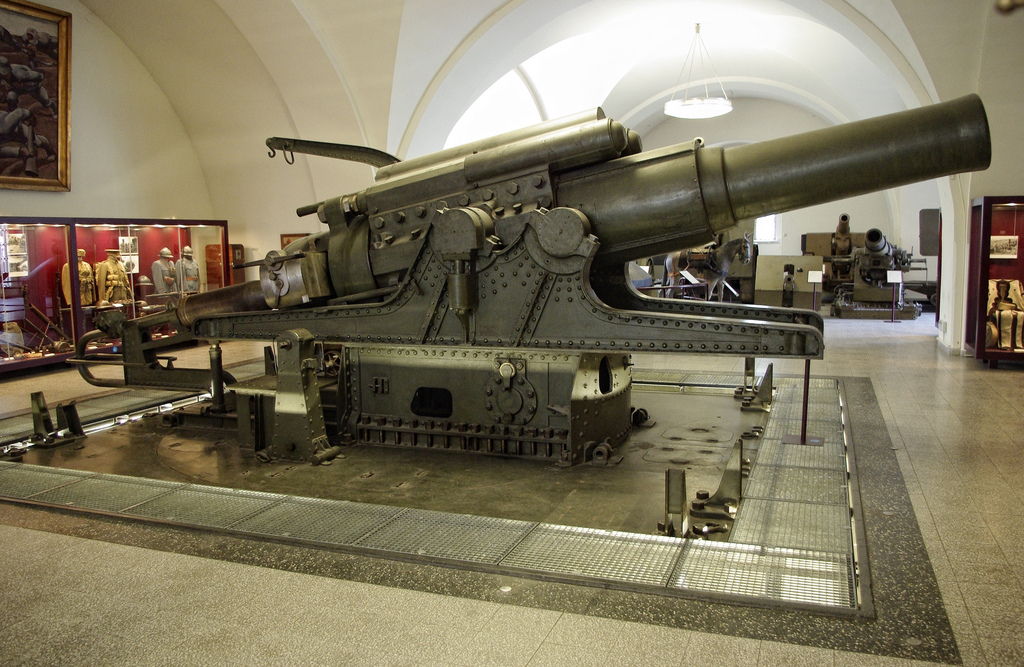 38cm Belagerungsgeschütz M16 im Heeresgeschichtlichen Museum Wien